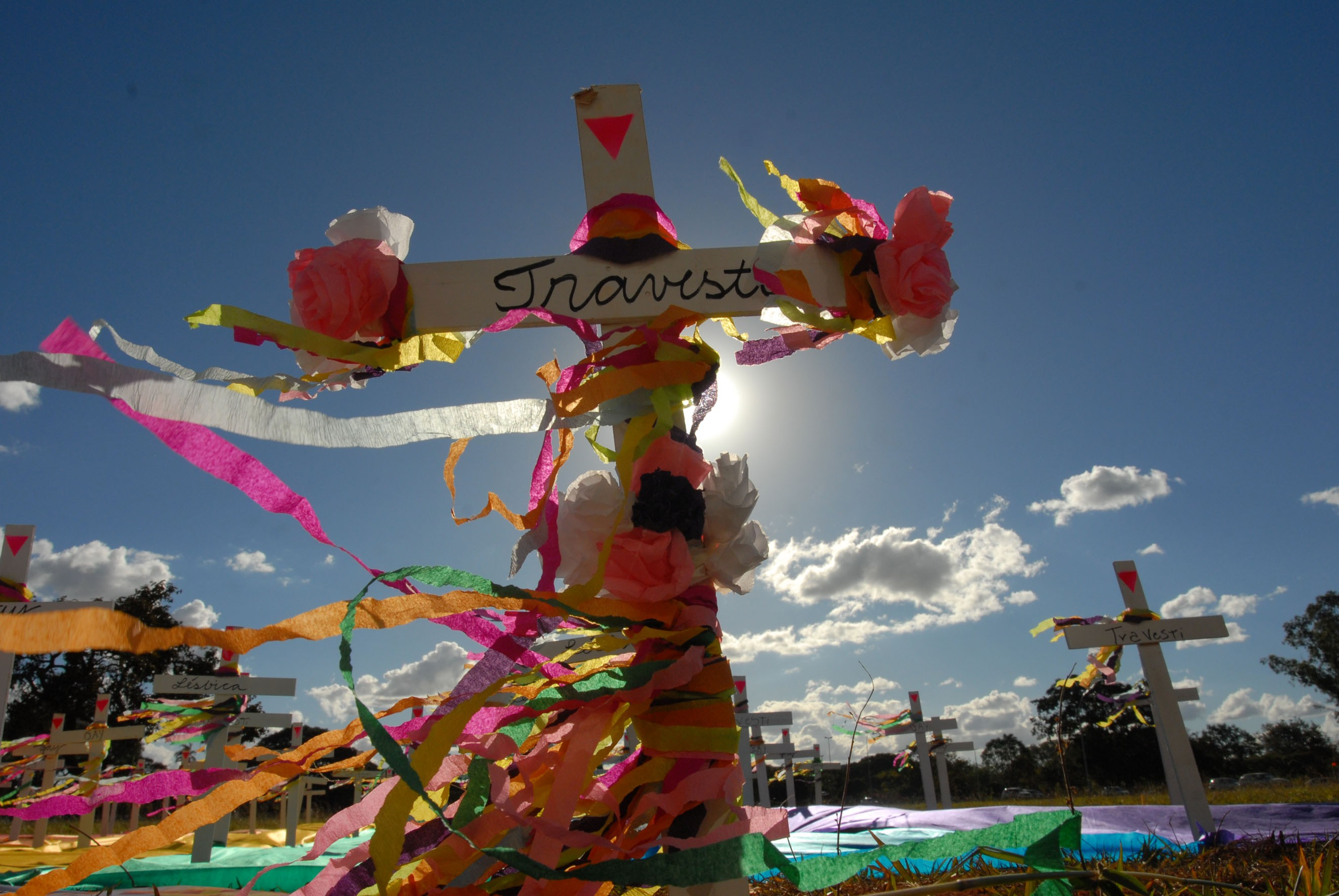 Manifestação contra Homofobia-travesti